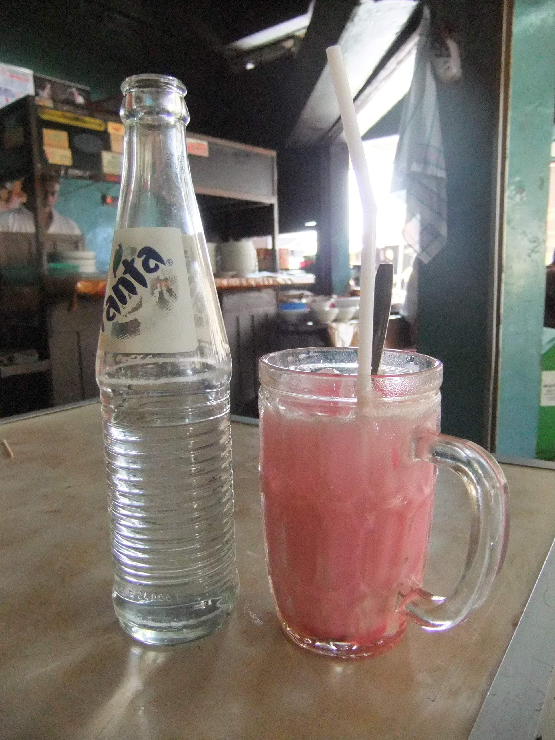 Es soda gembira